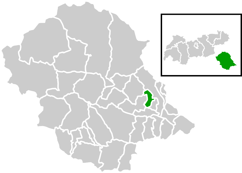 Lage der Gemeinde innerhalb des Bezirks Lienz